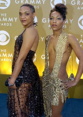 Les Nubians 4